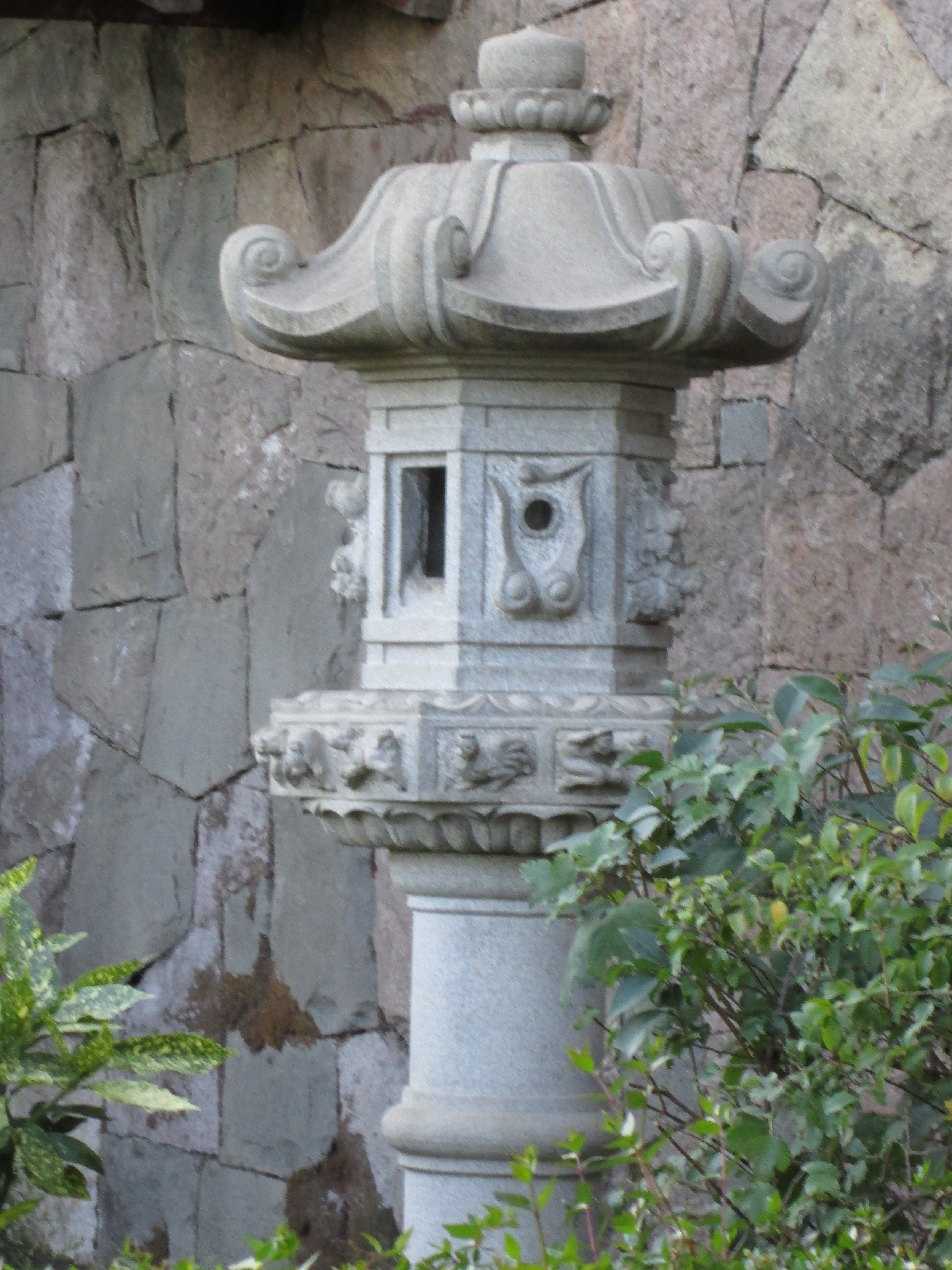 Farol japonés Fukimi